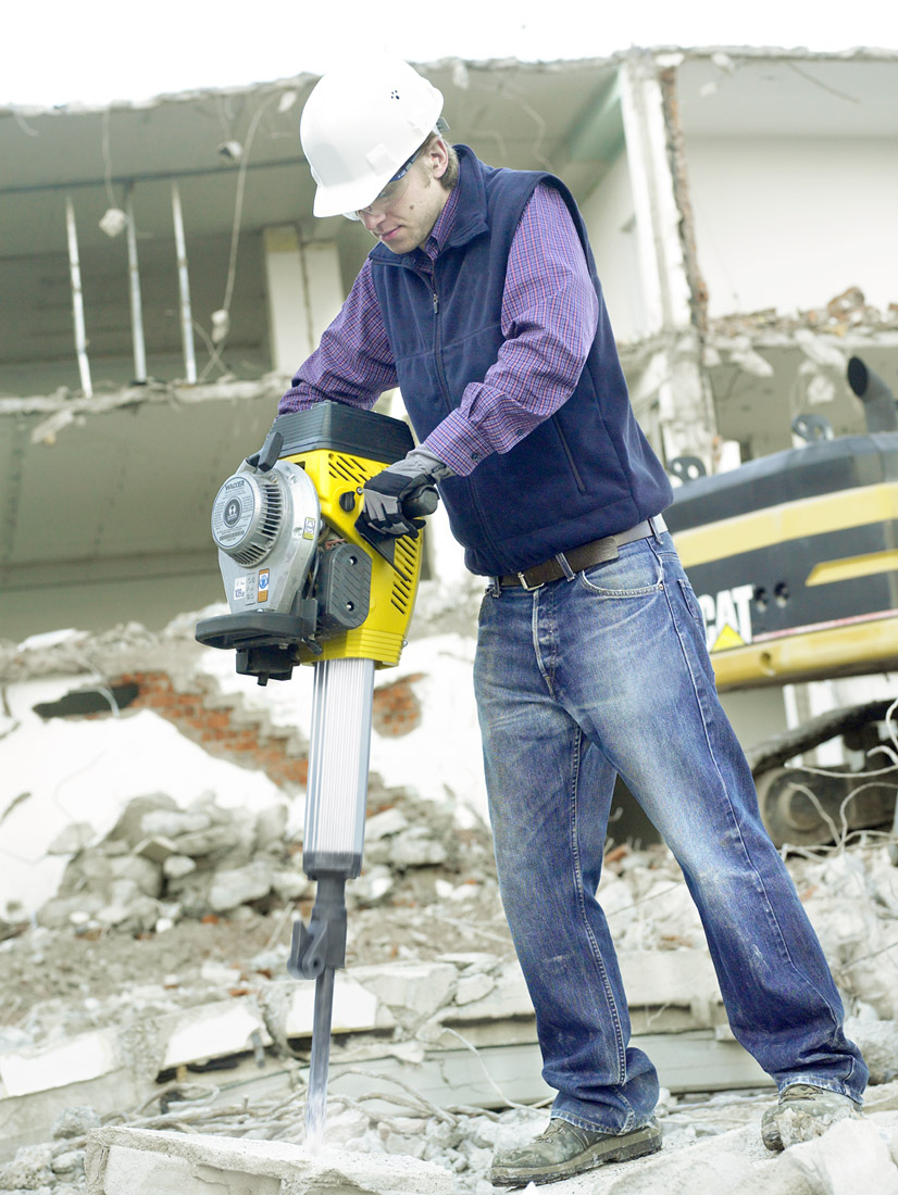 Wacker Neuson Benzin-Hammer